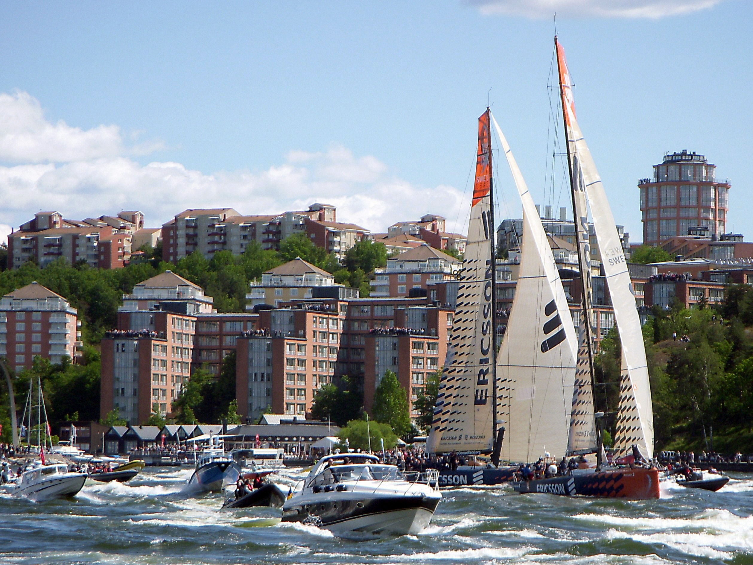 Volvo Ocean Race 2008/2009, Stopover Stockholm, SWE 3 + SWE 4